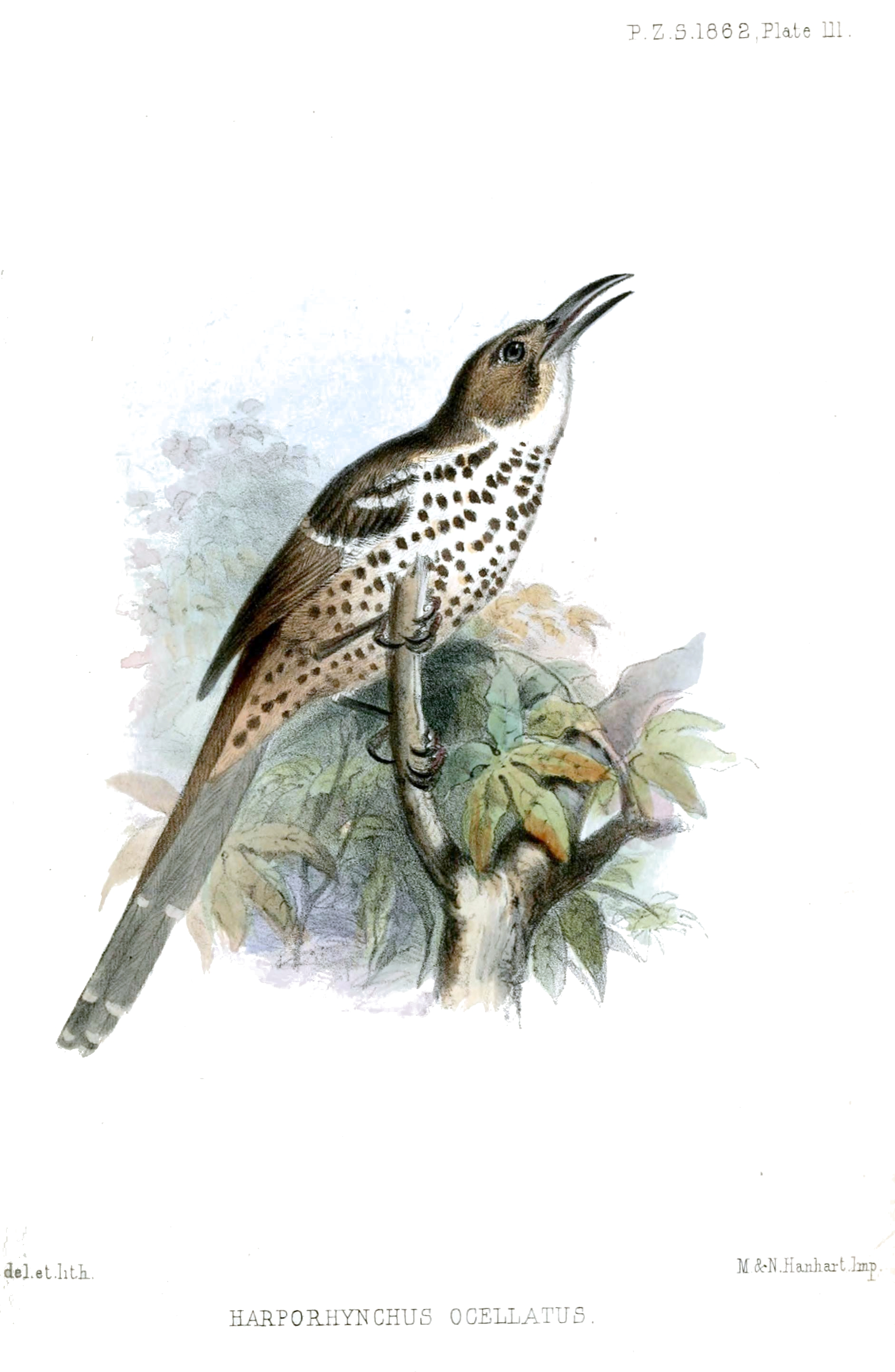 Harporhynchus ocellatus=Toxostoma ocellatum